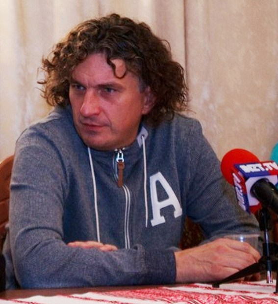 Руслан Мороз и Кузьма Скрябин во время интервью после концерта в Житомире